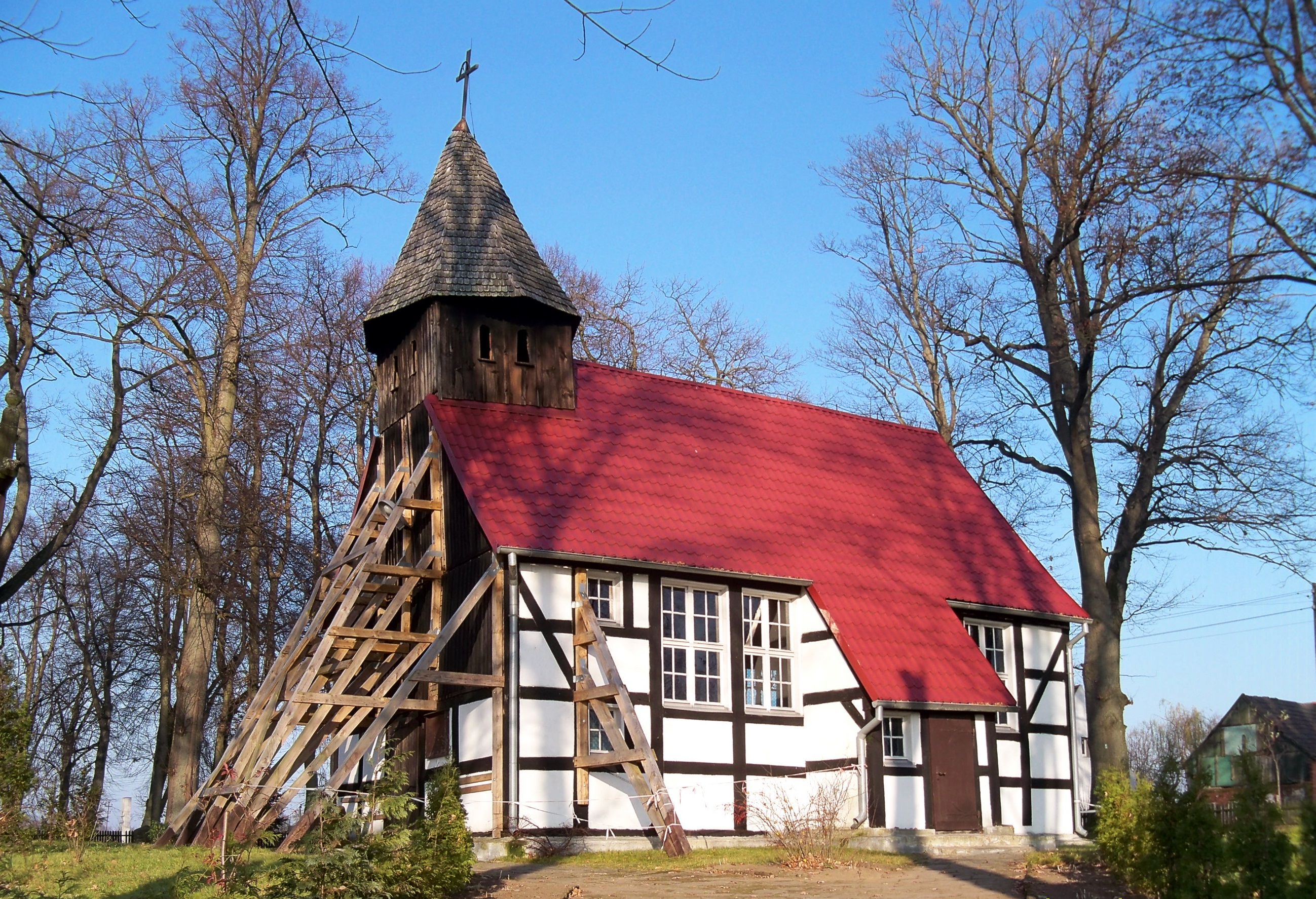 Karnieszewice - kościół p.w. NSPJ (zabytek nr rejestr. 601)